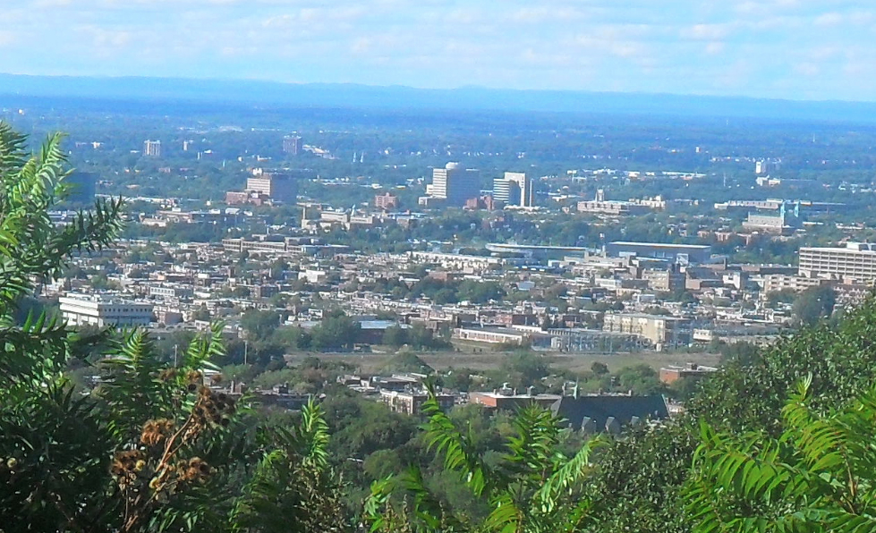 Le quartier Parc-Extension, vu depuis le mont Royal (sommet Outremont)